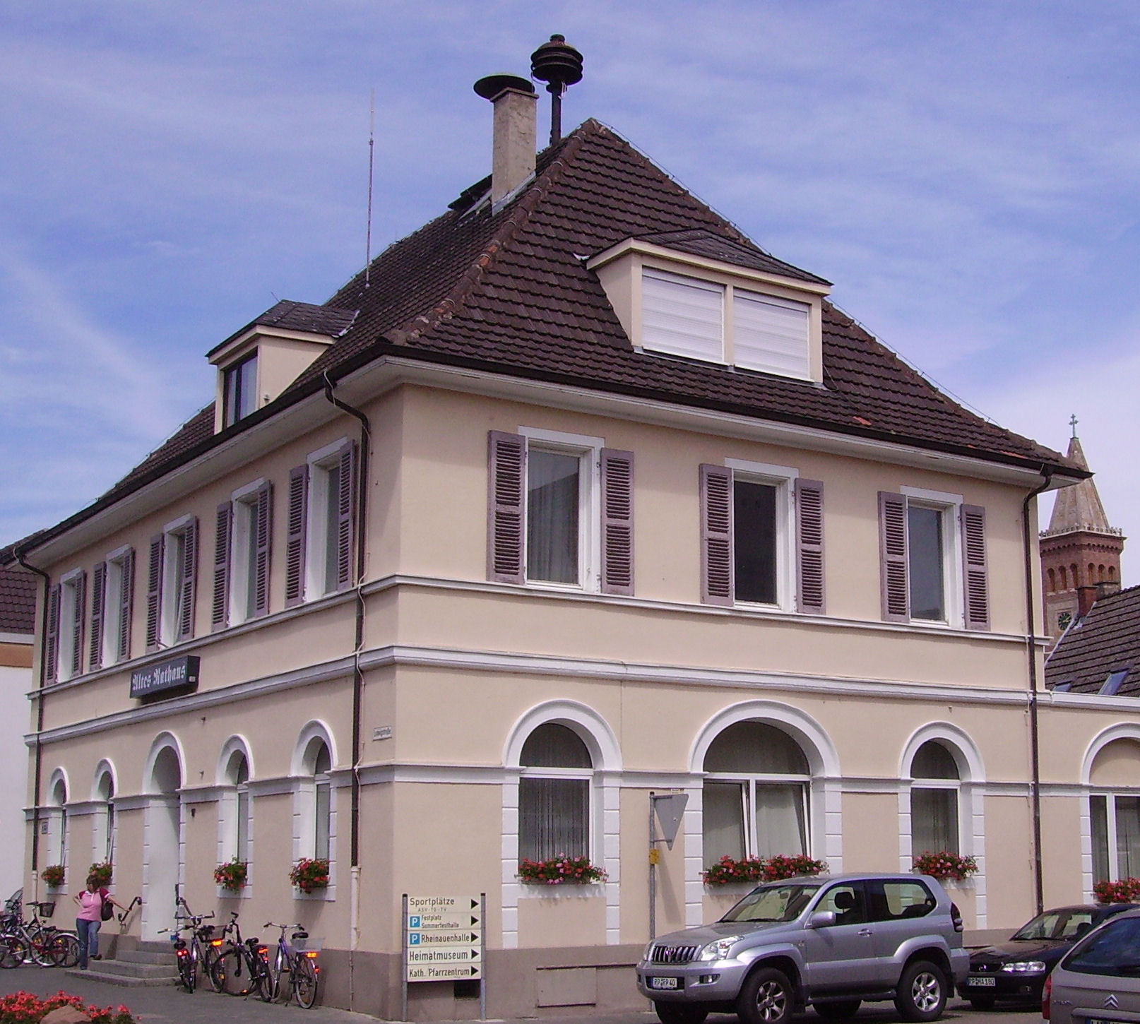 view of Waldsee, Germany